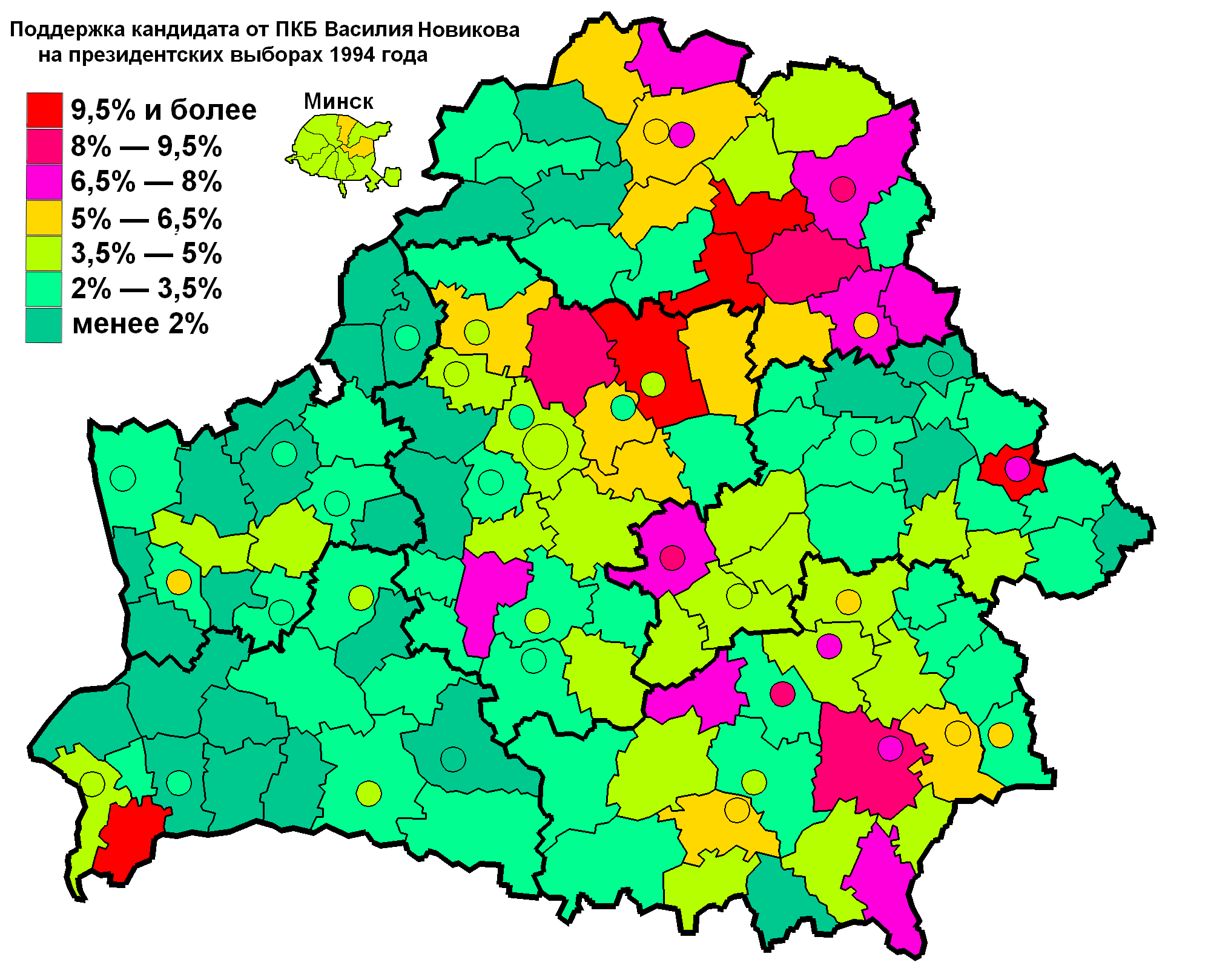 Карта поддержки кандидата от ПКБ Василия Новикова на президентских выборах Беларуси 1994 года